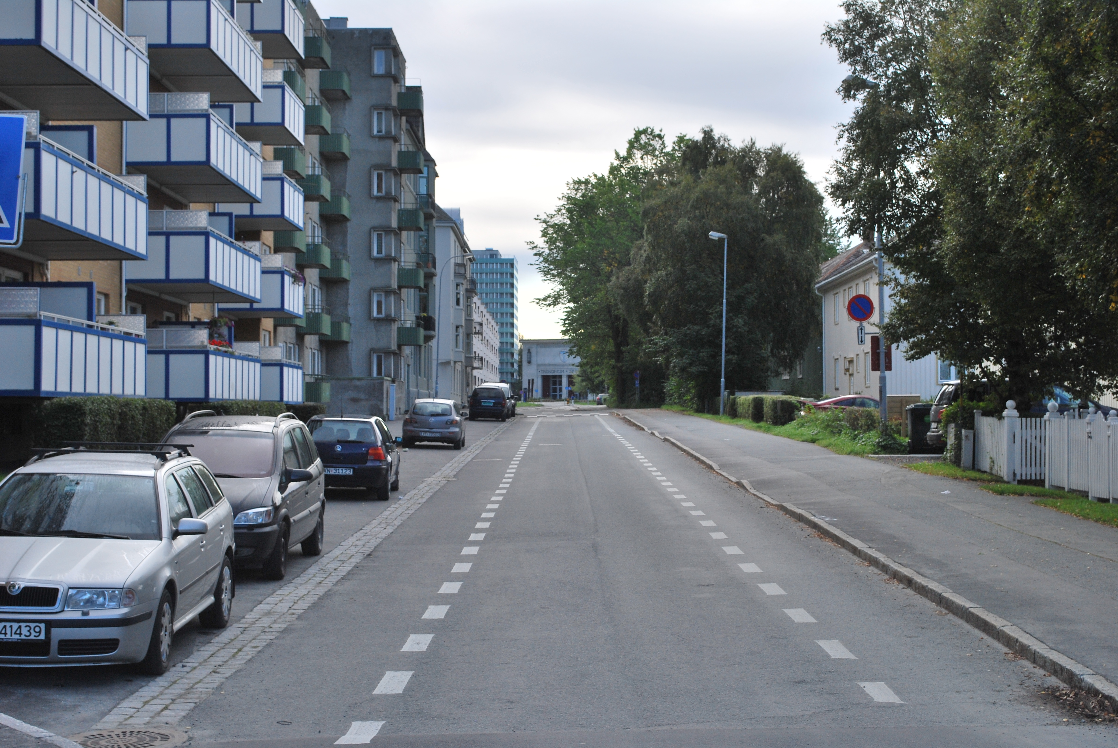 Udbyes gate på Øya i Trondheim